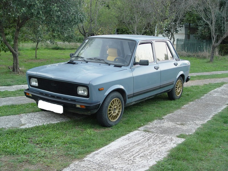 Zastava Skala 128 self-made